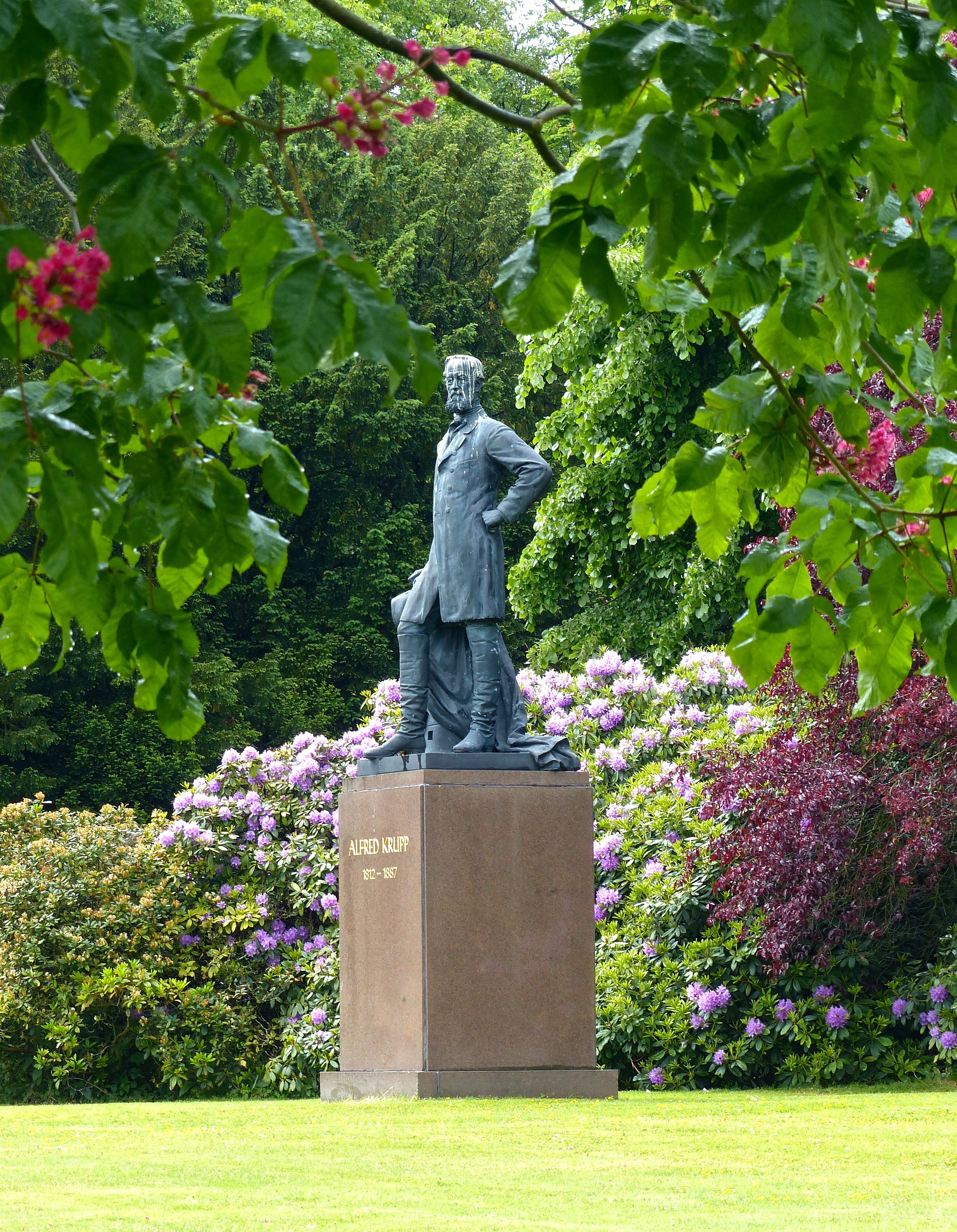 LSG Parkanlage Villa Hügel: Denkmal Alfred Krupp